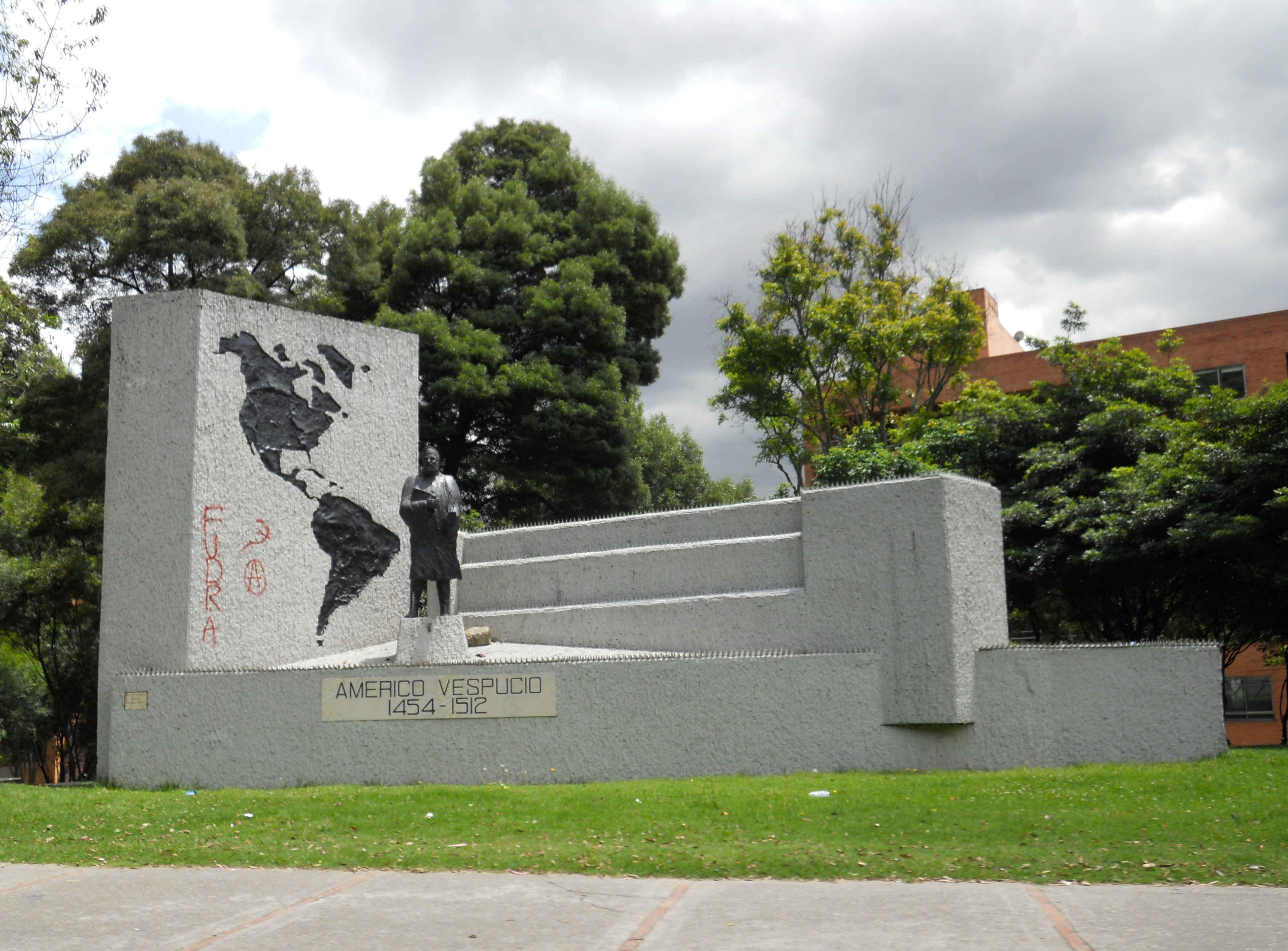 Monumento a Américo Vespucio en Bogotá. Carrera Séptima con calle Noventa y seis. Barrio Chicó.